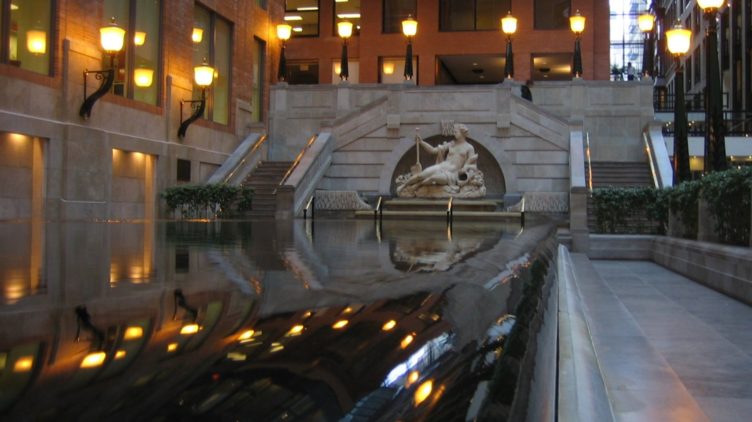 Montréal - Centre de Commerce Mondial, Statue d'Amphitrite. Sculptor: Dieudonné-Barthélemy Guibal